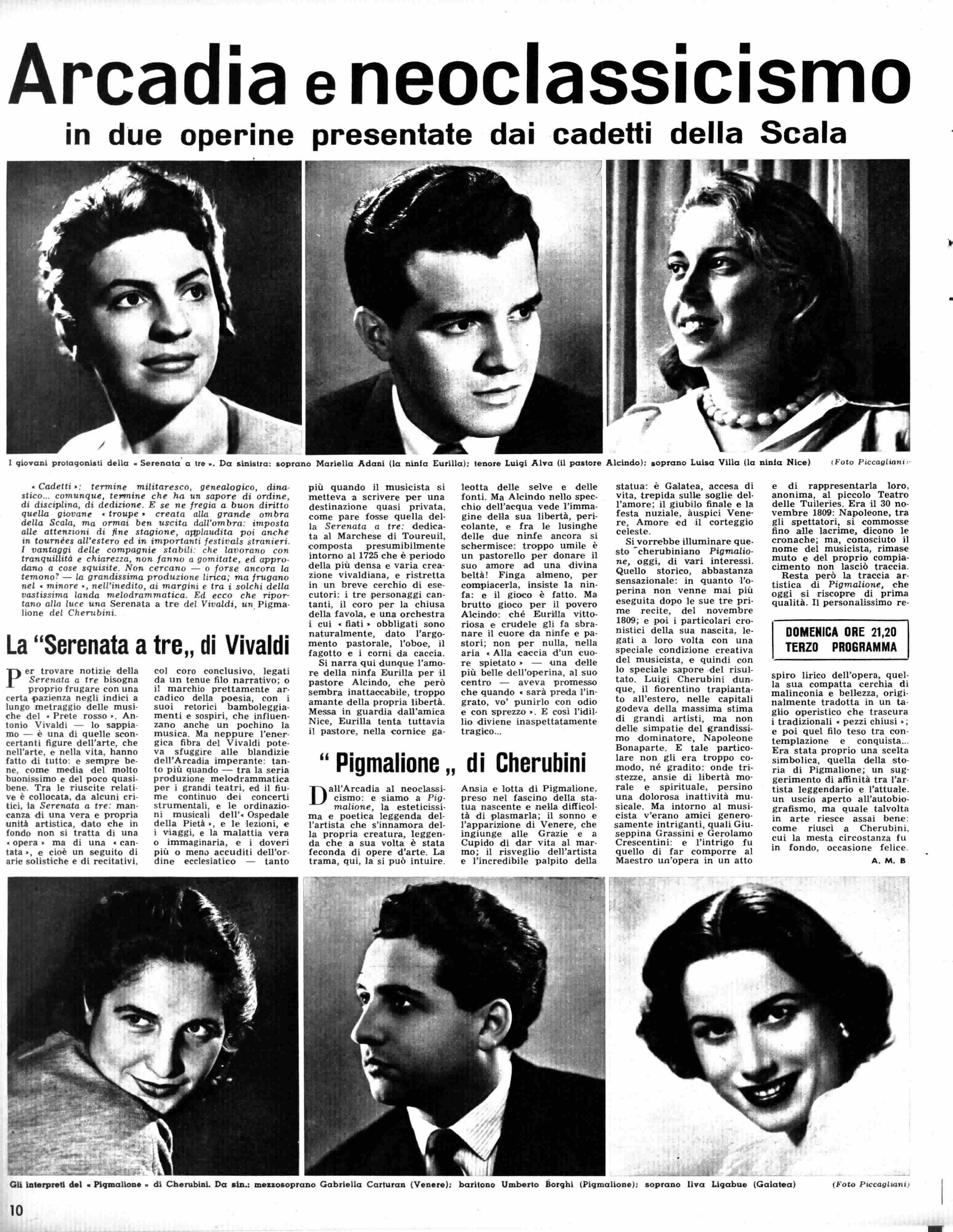 Pagina del Radiocorriere TV 1955 n.25 pag.10